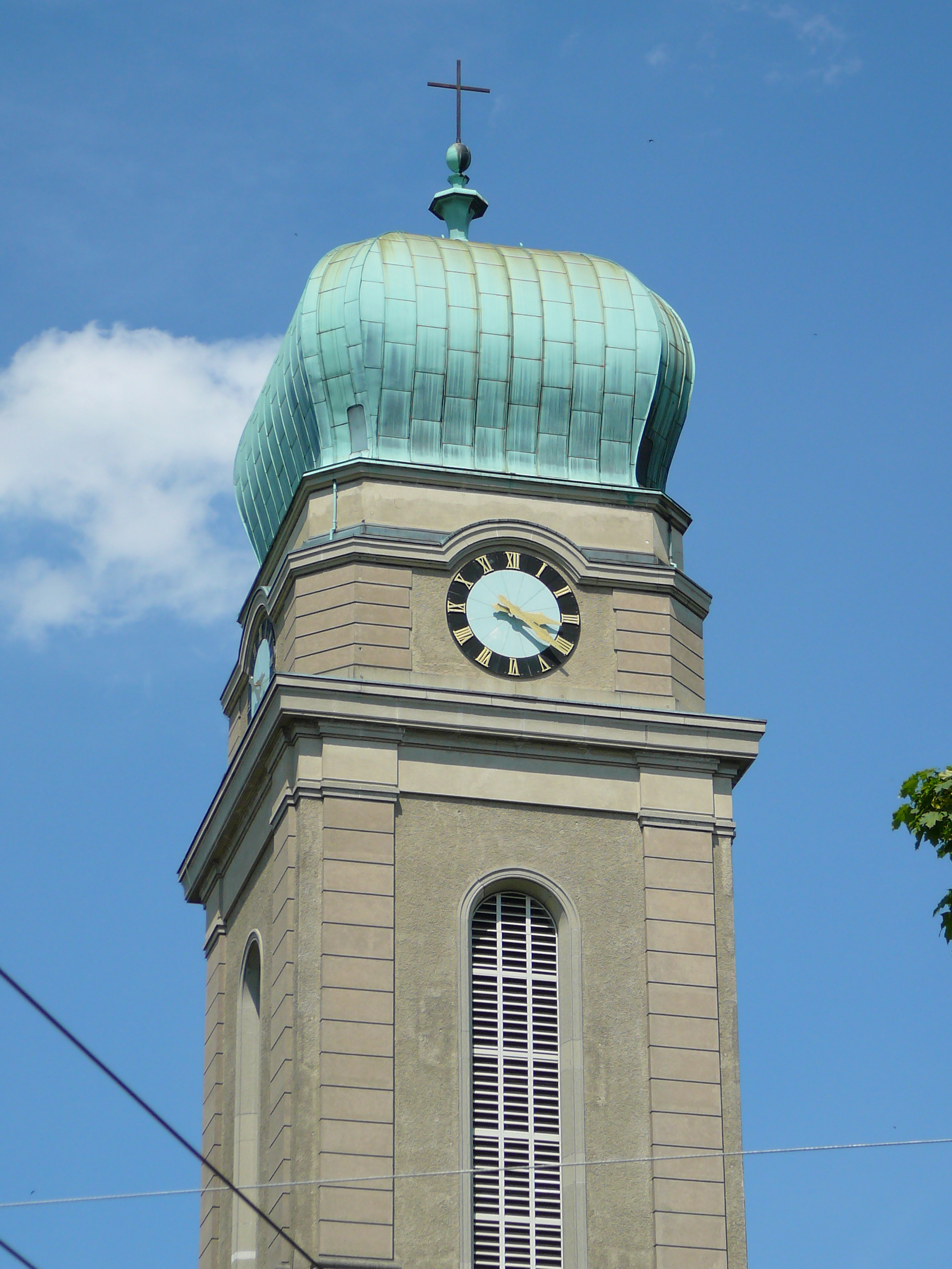 römisch-katholische Kirche Guthirt Zürich-Wipkingen, Kirchturm